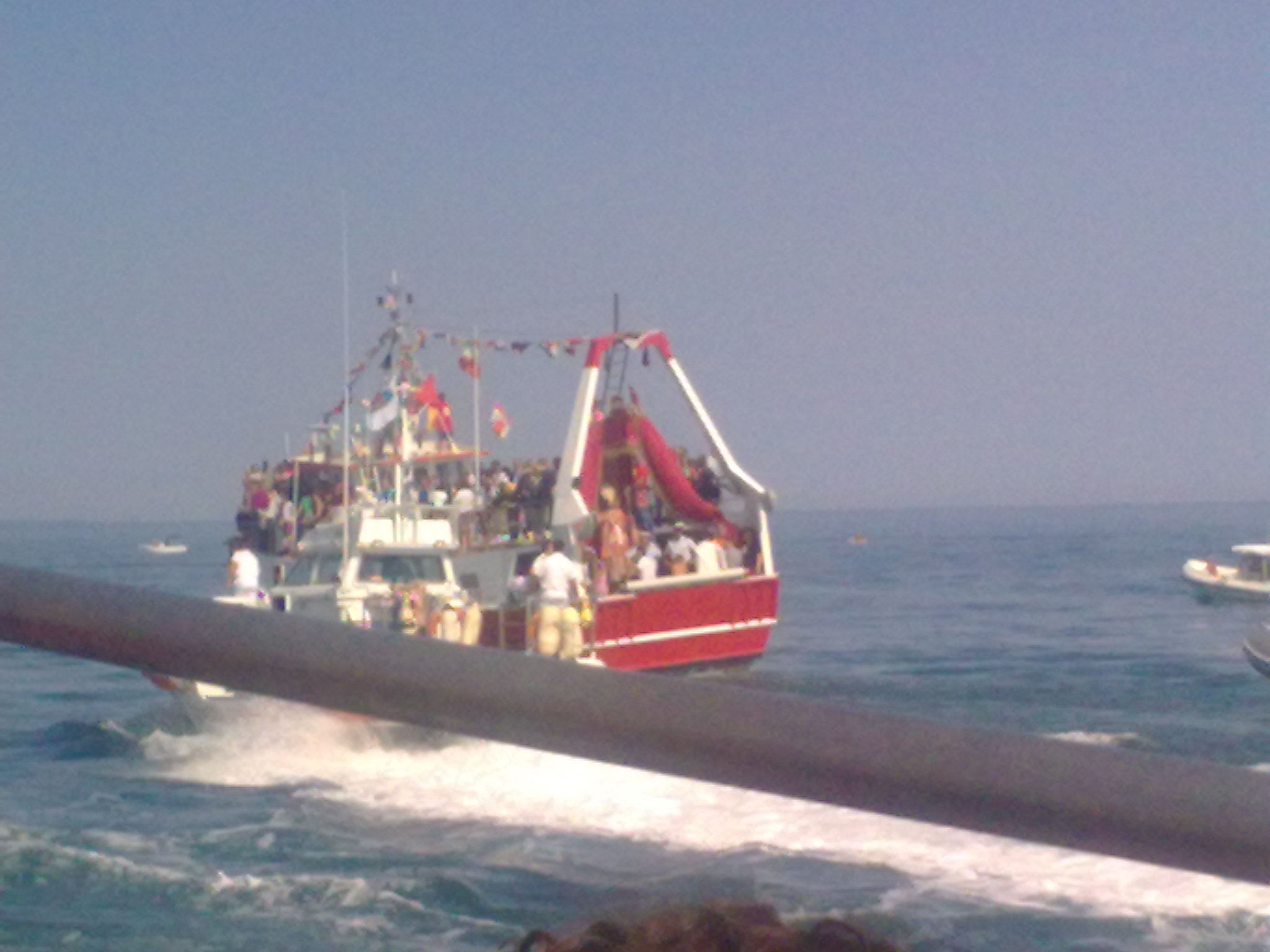 La processione a mare di San Basso, 2011